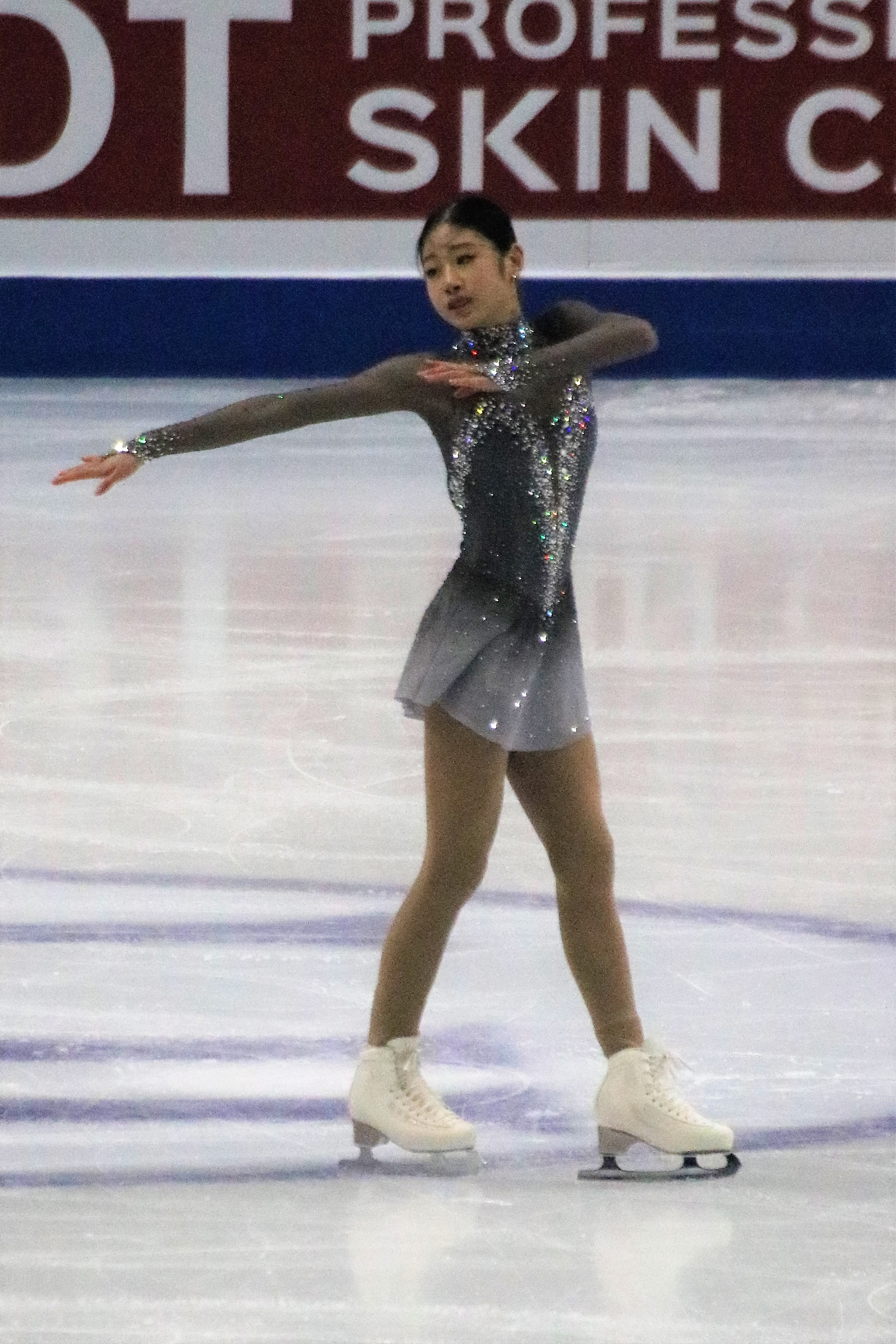 Ли Хэ Ин (Южная Корея) на финале юниорского Гран-при 2019-2020